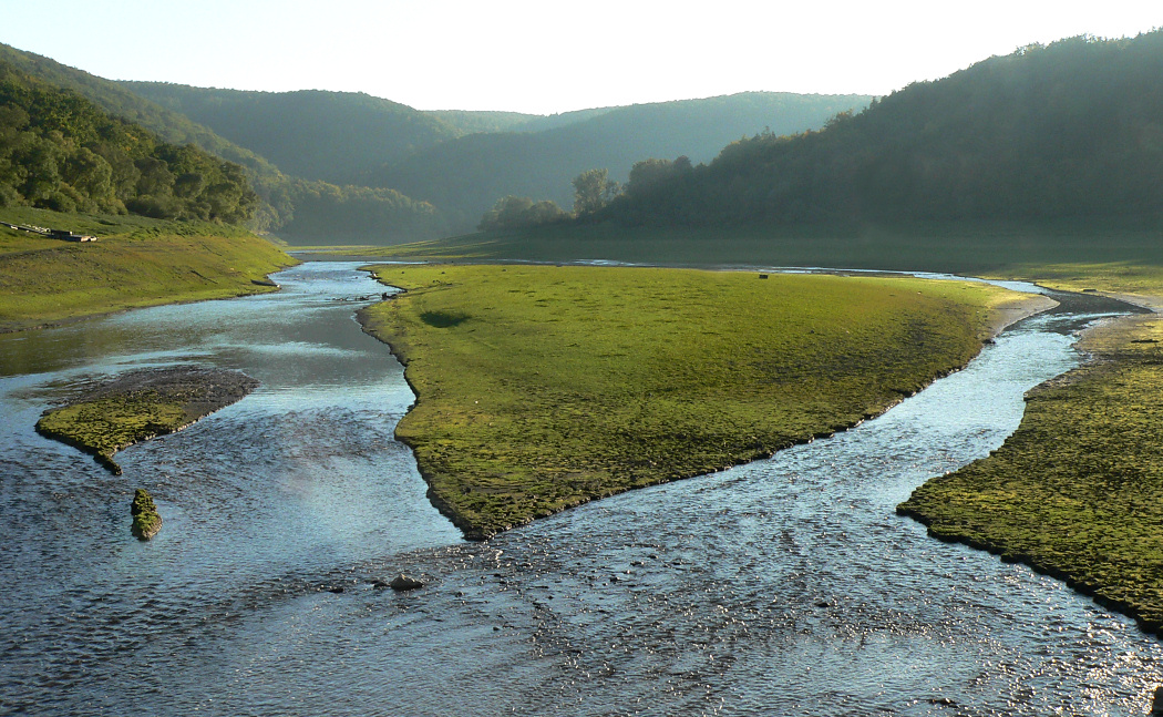 Eder im trockengefallenen Edersee